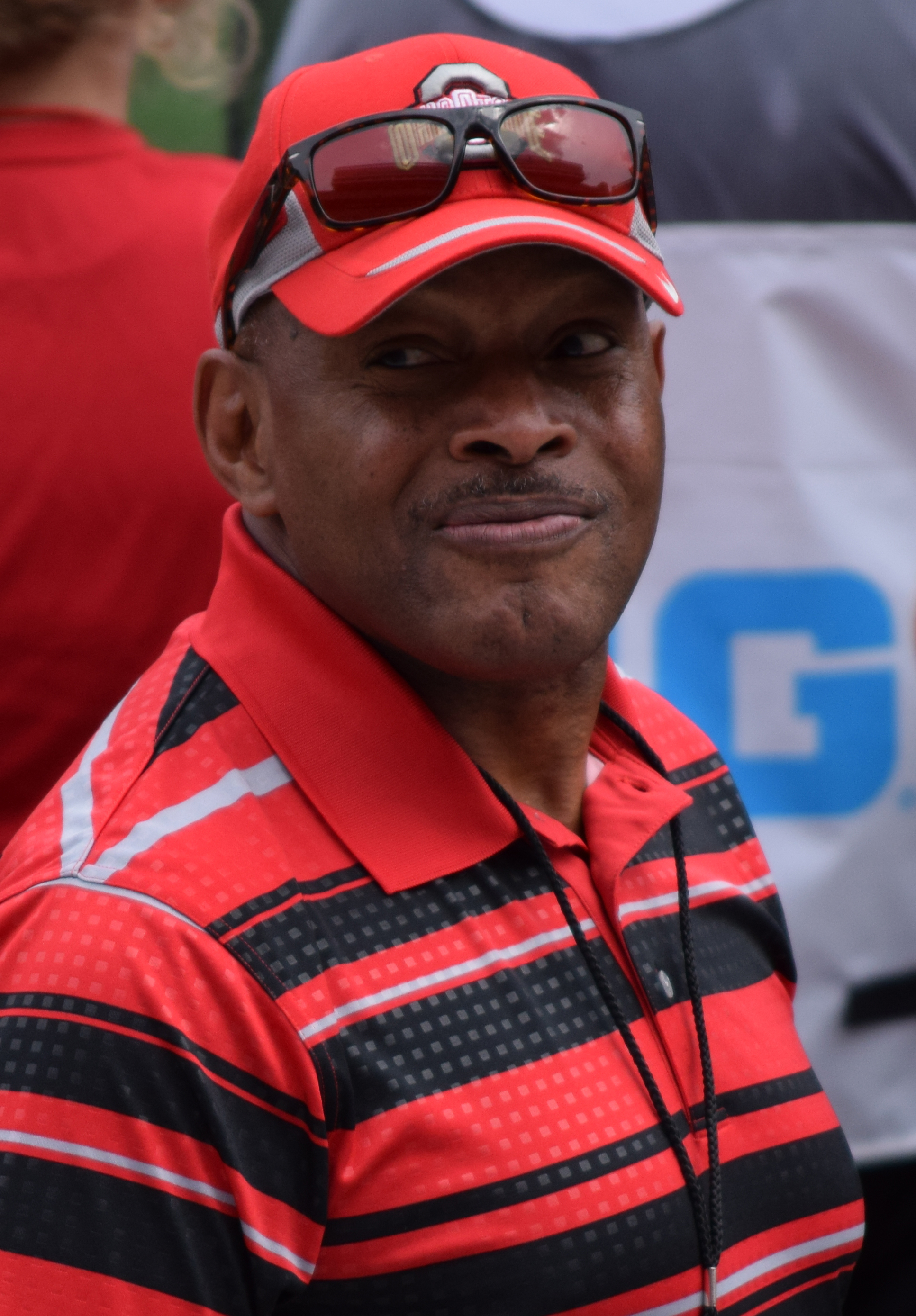 Archie Griffin in 2015